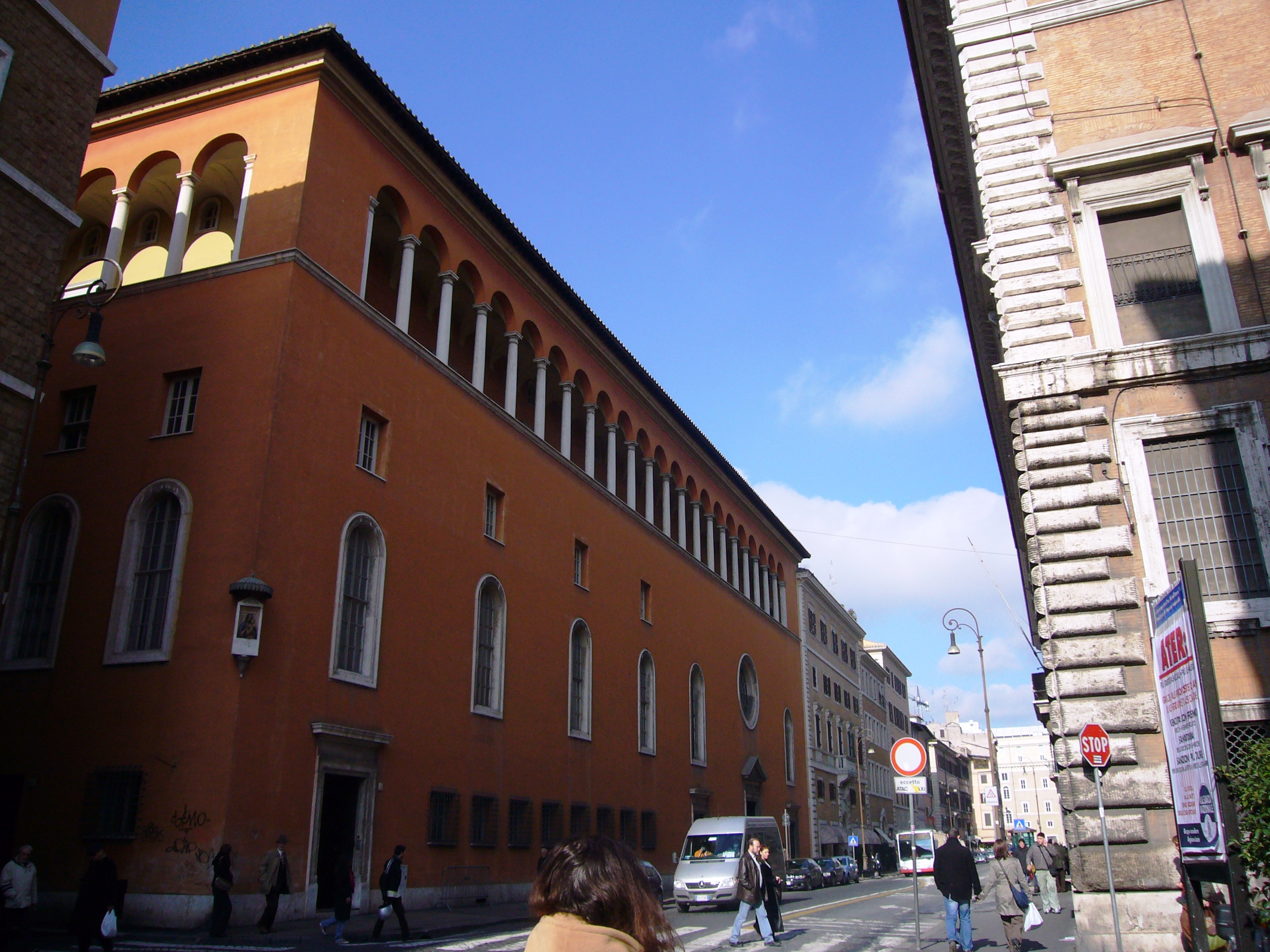 Roma, corso Rinascimento: a sinistra la facciata della chiesa di Nostra Signora del Sacro Cuore (1938)